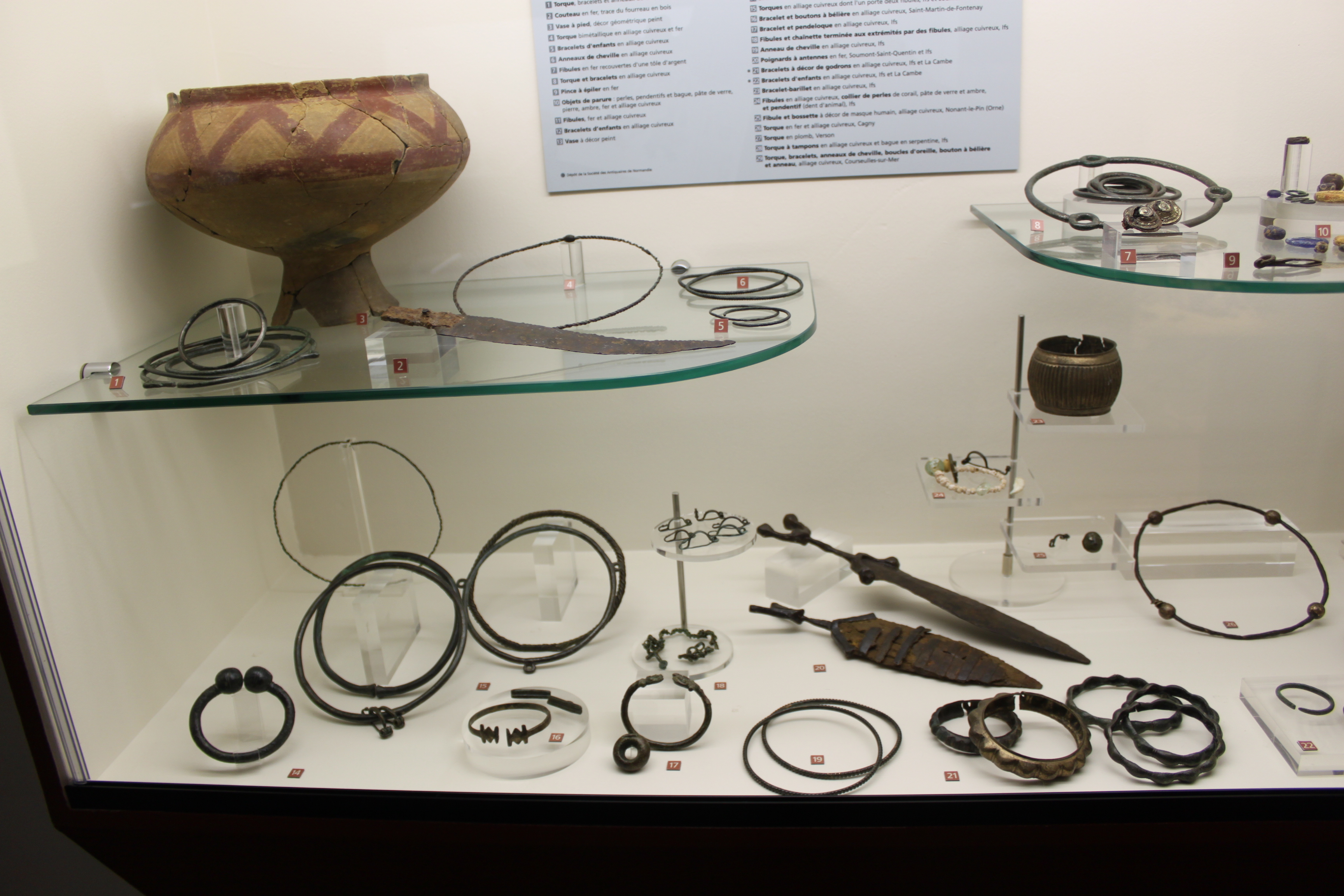 Caen, France